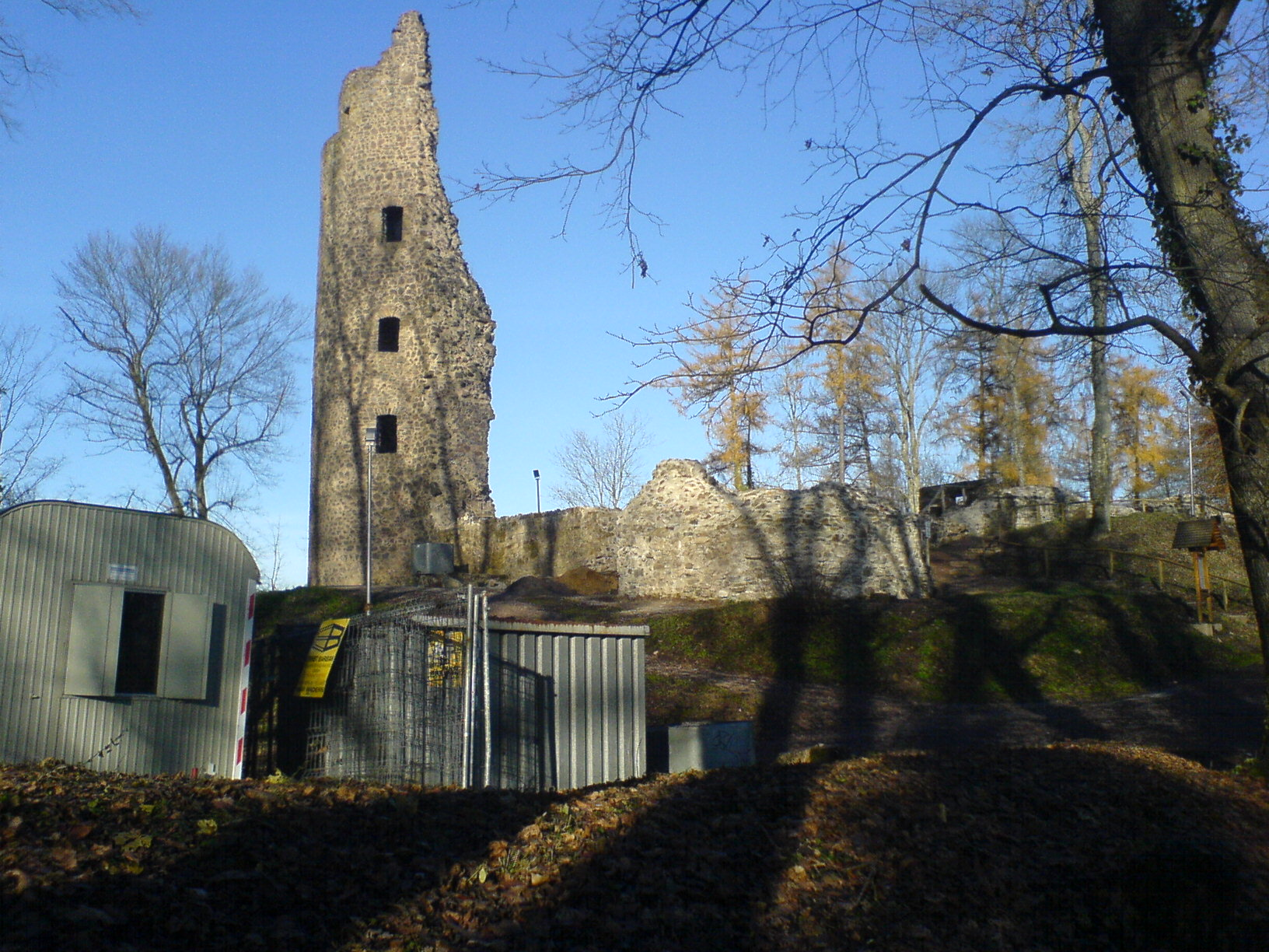 Burgruine Dagstuhl